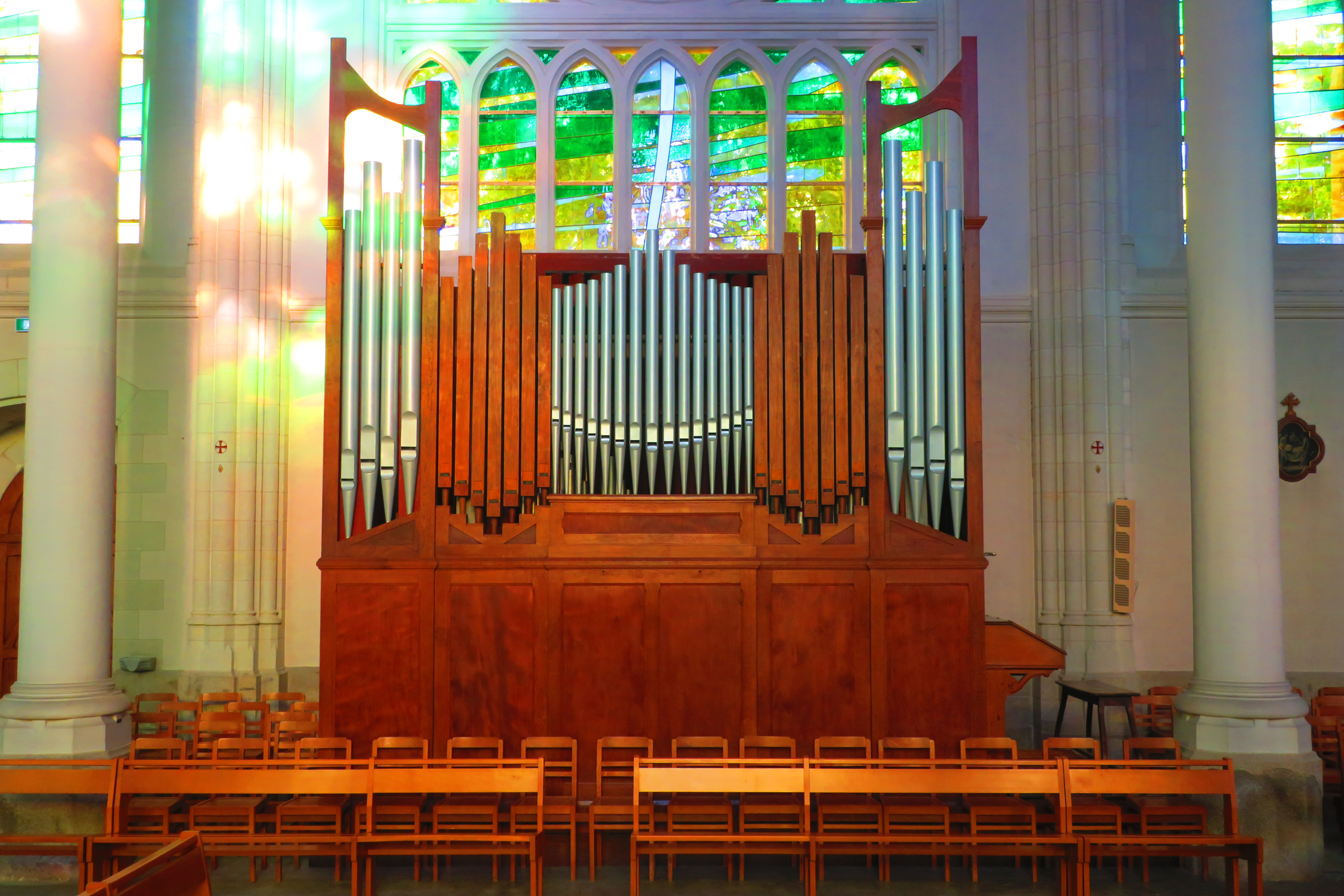 L'orgue construit par Auguste Tolbecque à la fin du XIXème siècle. Dans l'église Saint-Léger d'Orvault depuis mai 2018.